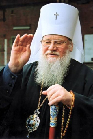 Кириченко Николай Васильевич